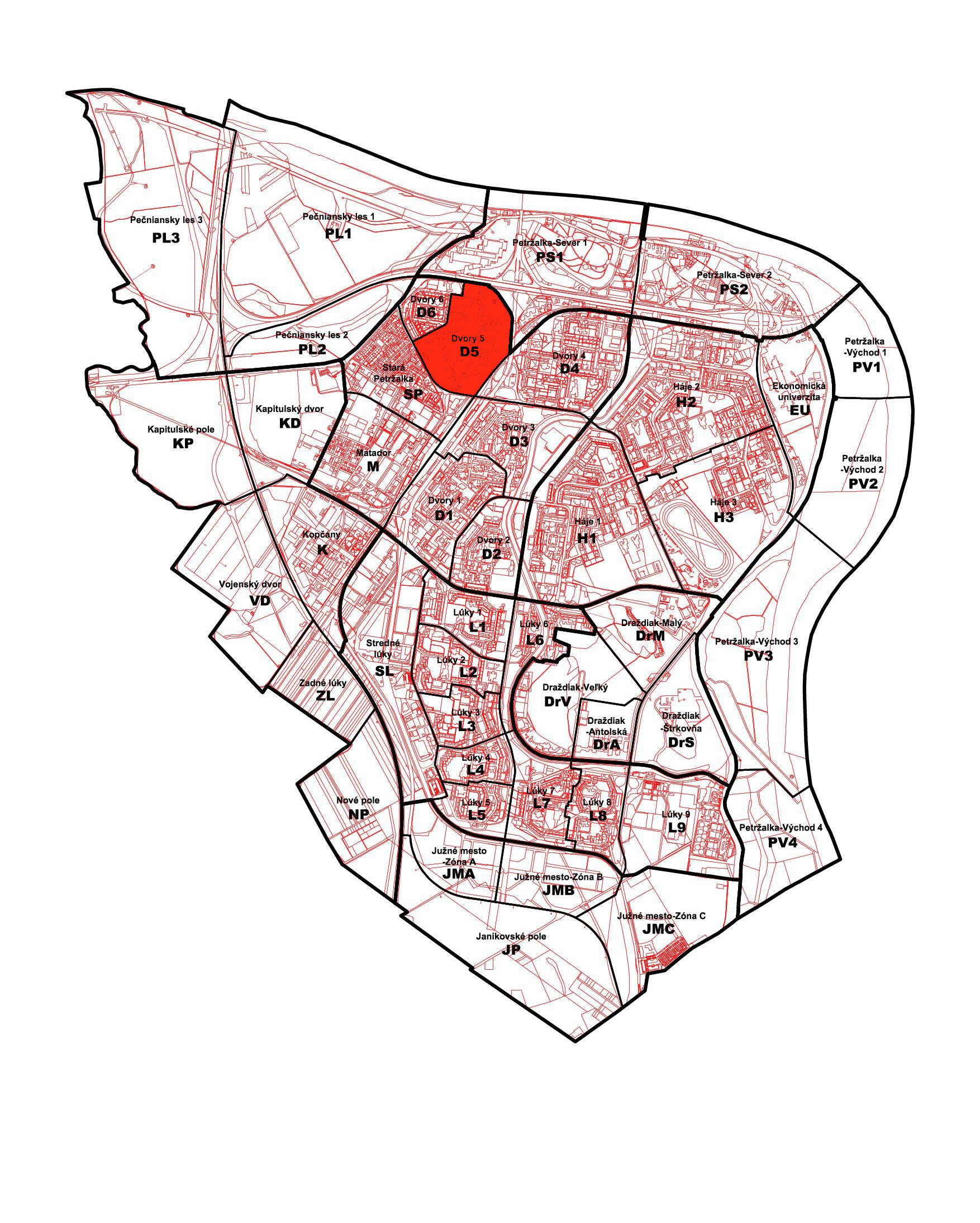 Poloha petržalskej miestnej časti